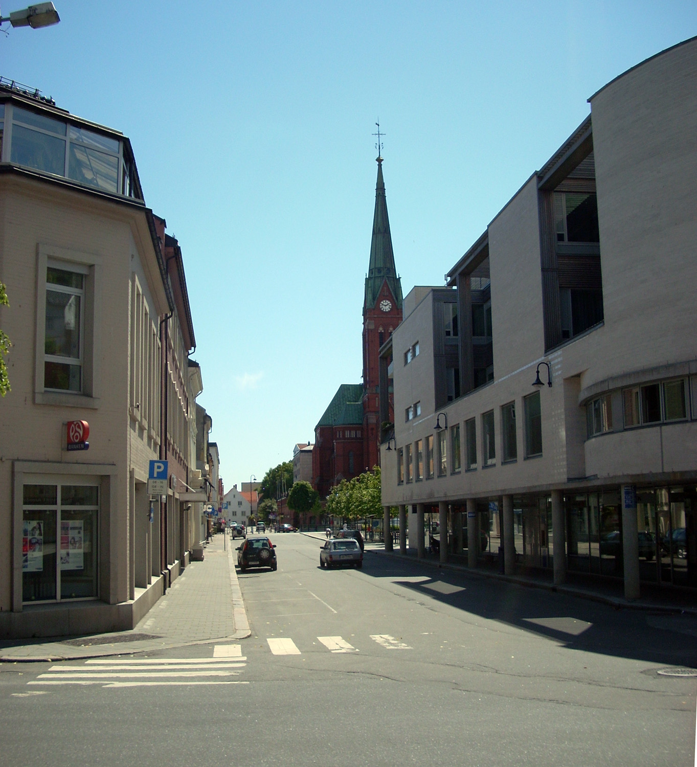 Peder Thomassons gate i Arendal